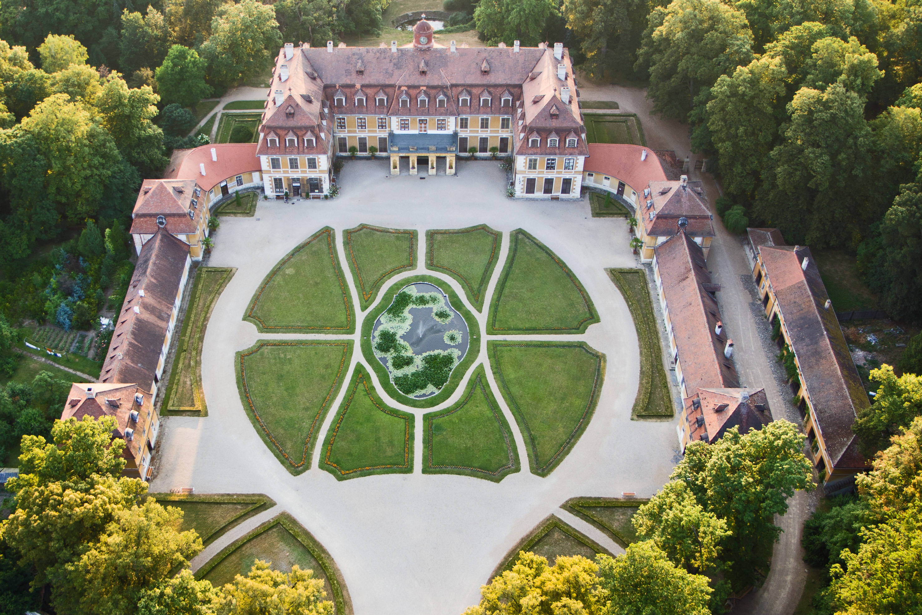 Zámek Rájec, Blanenská 1, Rájec